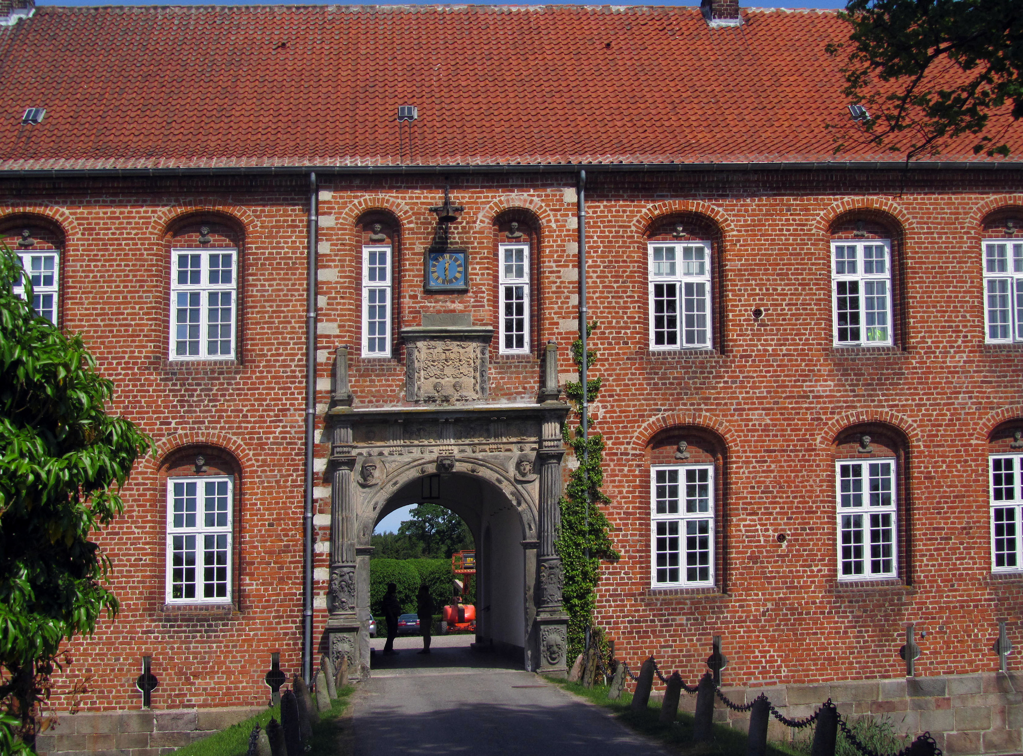 Visborggård sydporten